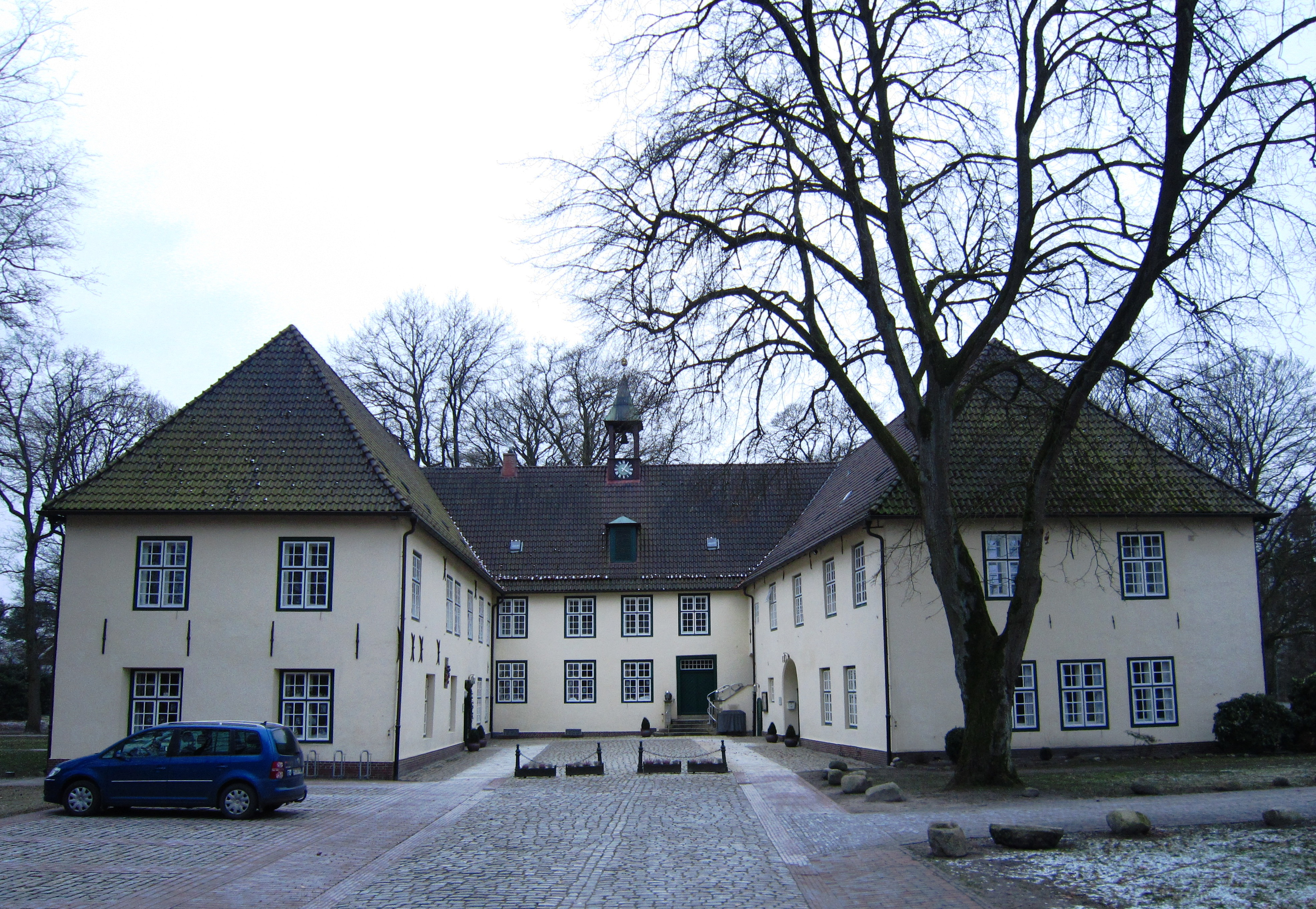 Schloss Neuenburg (Zetel - Neuenburg - Friesland)